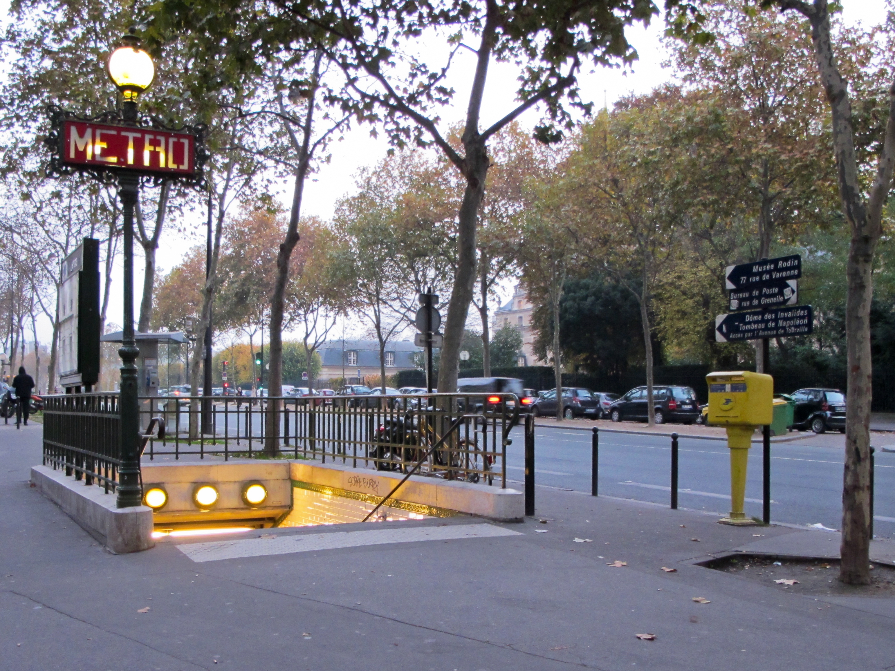 Station de métro Varenne (Paris Metro ligne 13) métro de Paris, France